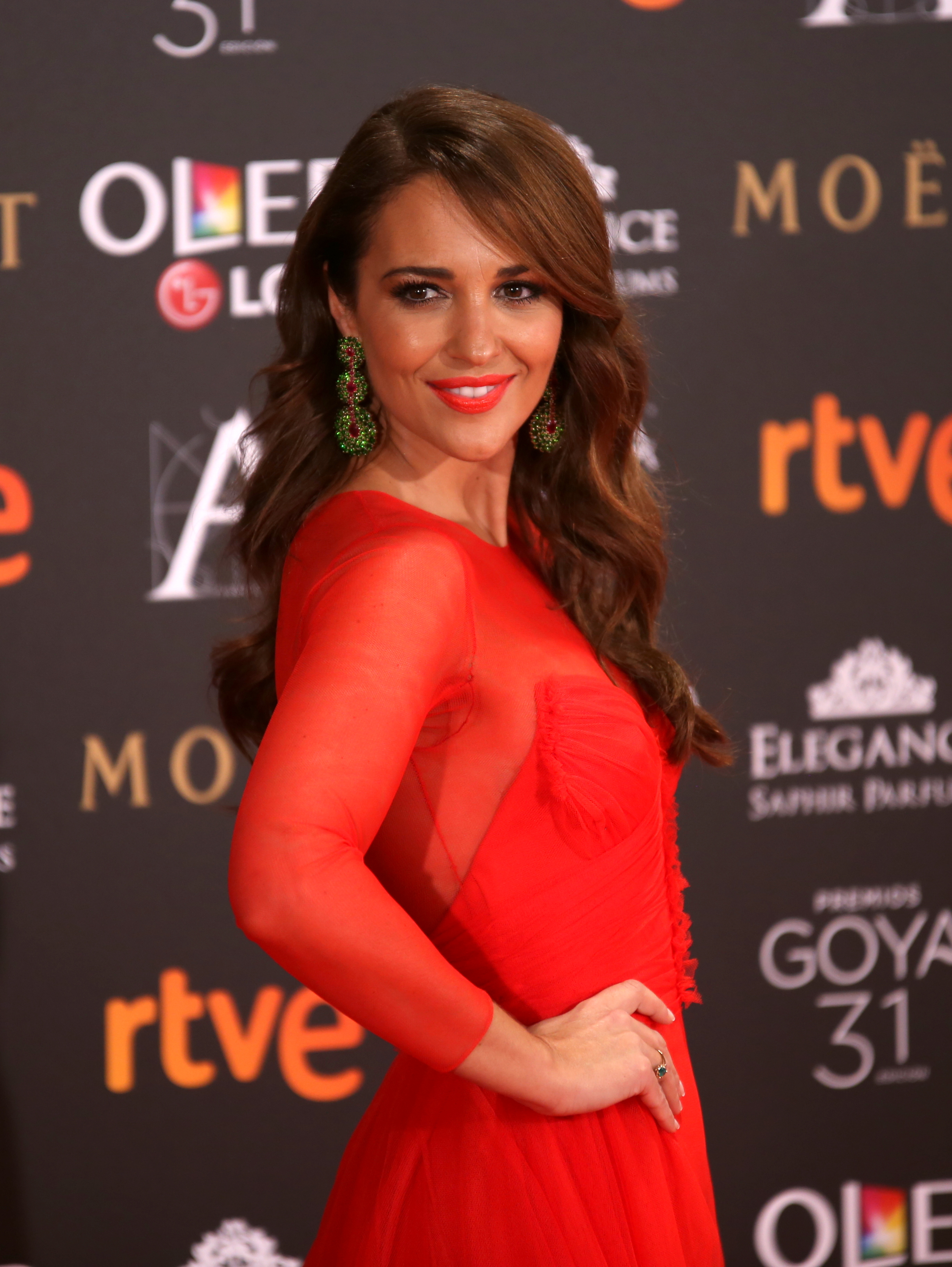 Premios Goya 2017